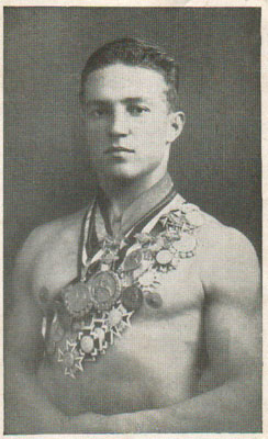 Aufnahme aus 1924, Fotograph unbekannt, Bild befindet sich in meinem Eigentum, selbst eingescannt und bearbeitet.